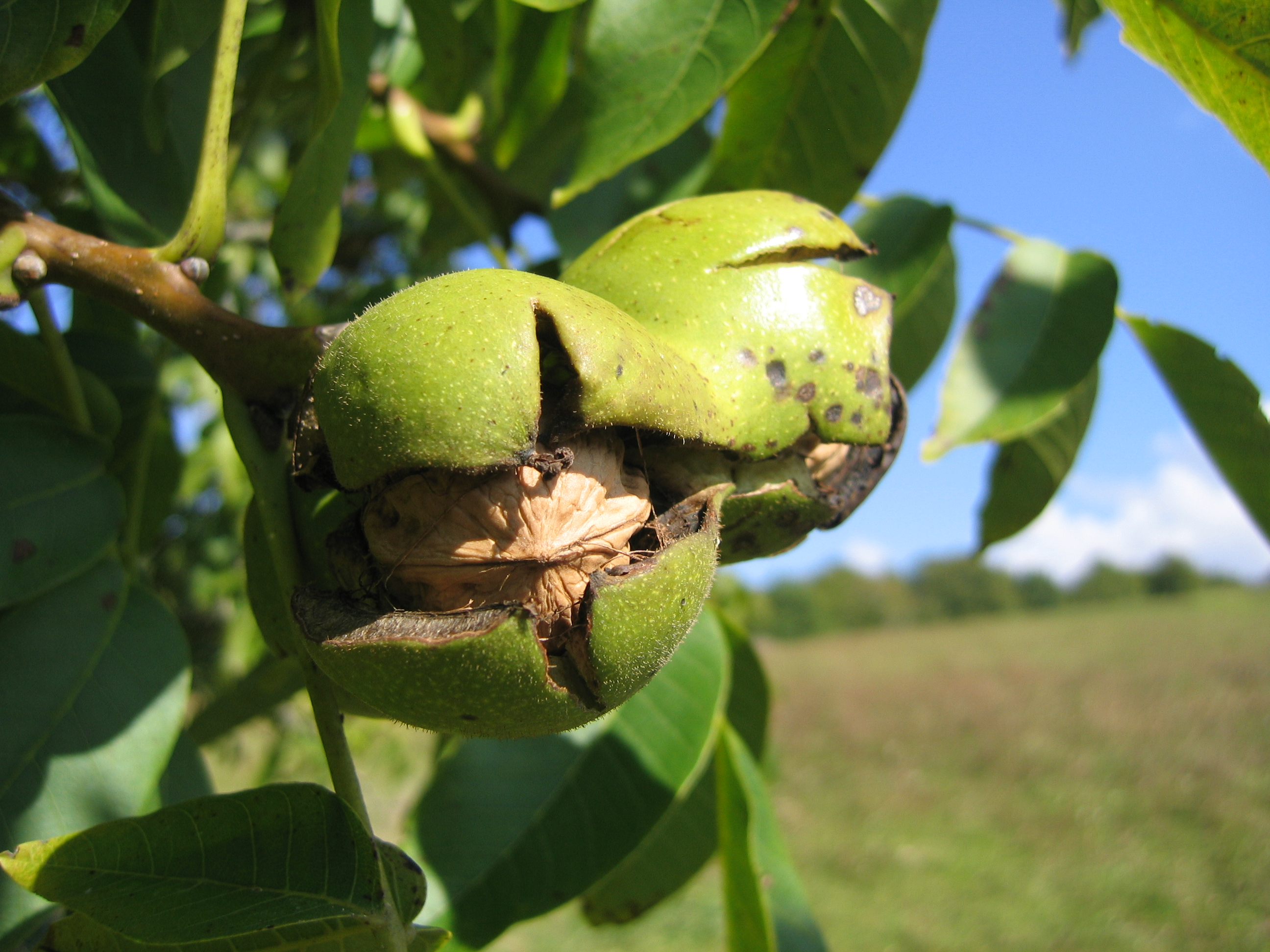 noix en automne Juglans regia